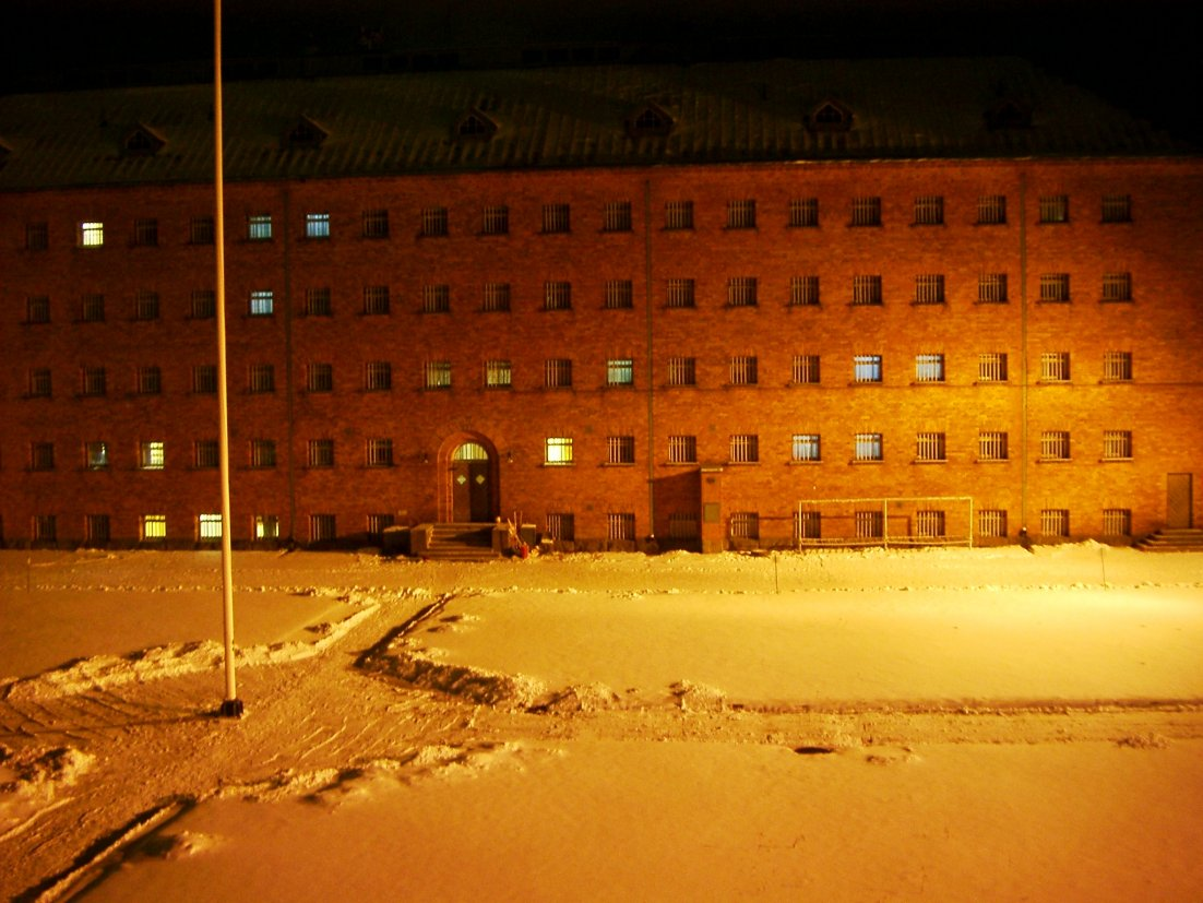 Itse otettu kuva. Kuvaaja: Jyrki Heinonen